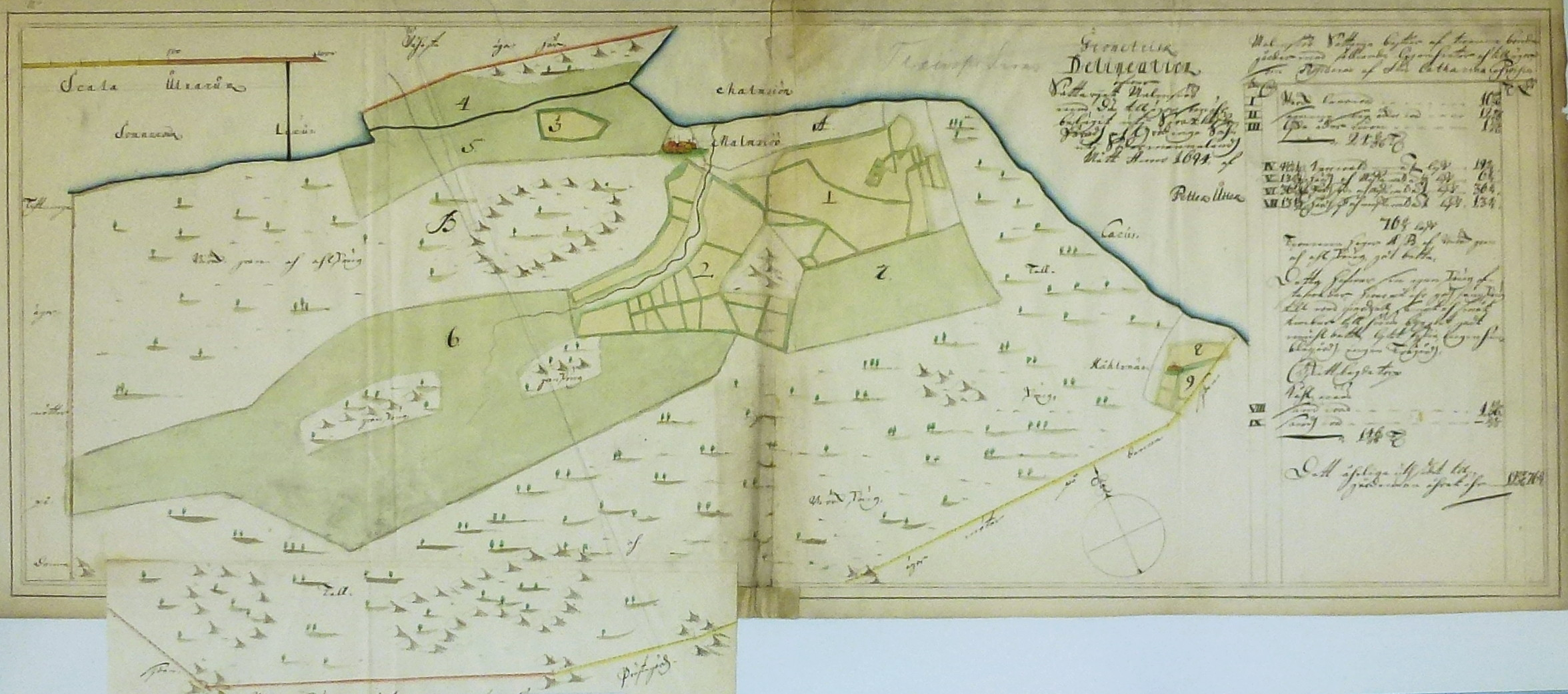 Geometrisk avmätning från 1694 över Malmsjö (Malma 1-2)